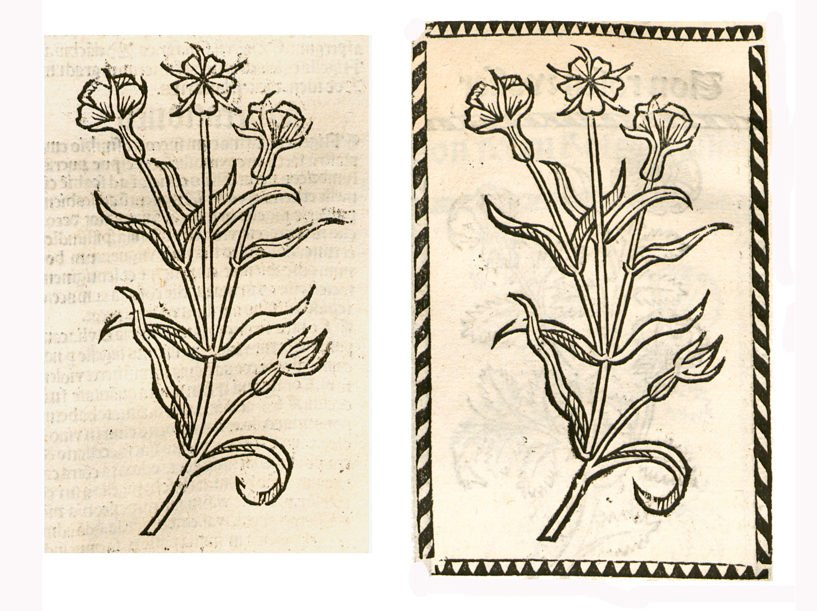 Abbildung von: Ratten Krut (Agrostemma githago)